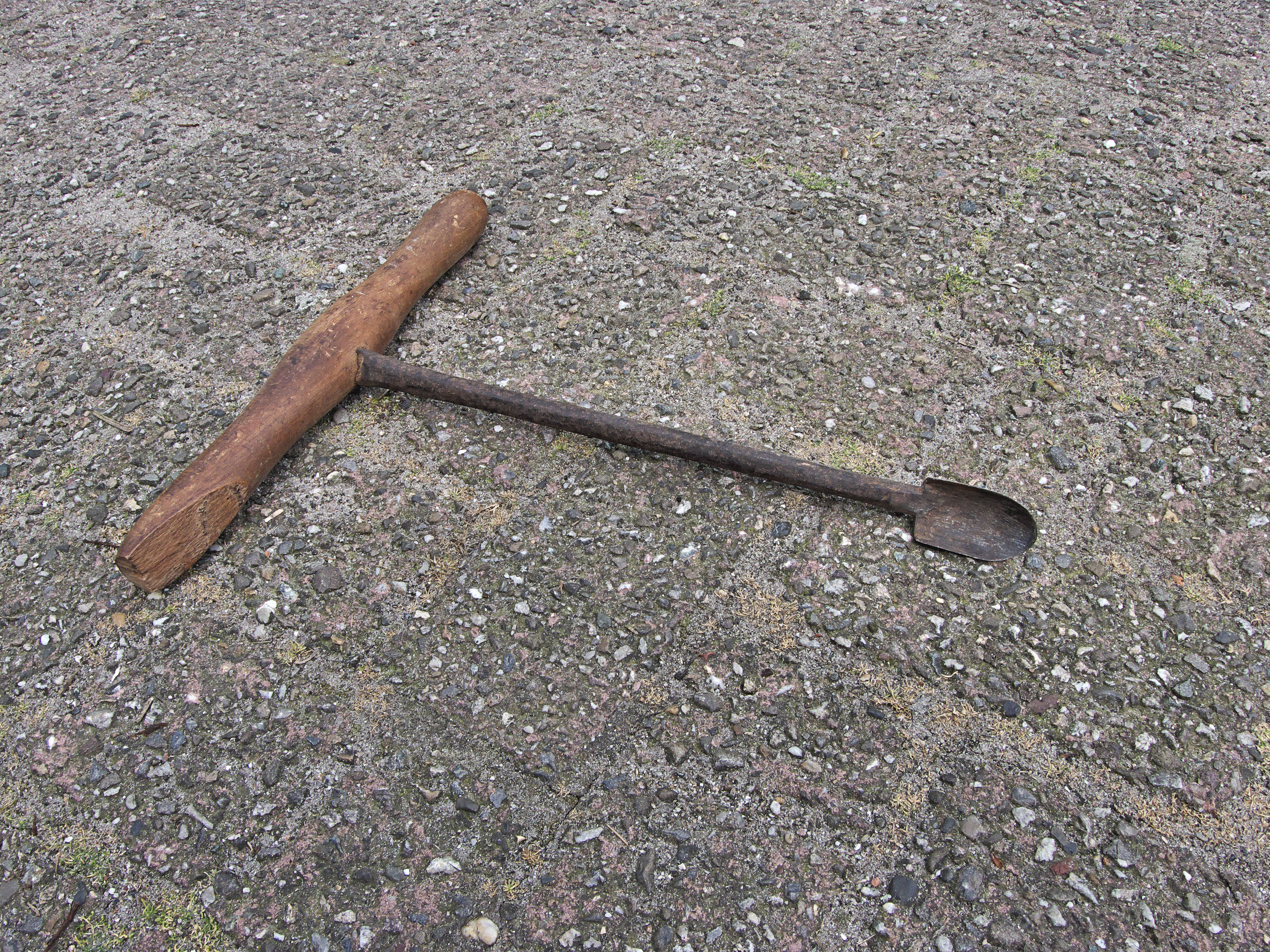 Lepelboor